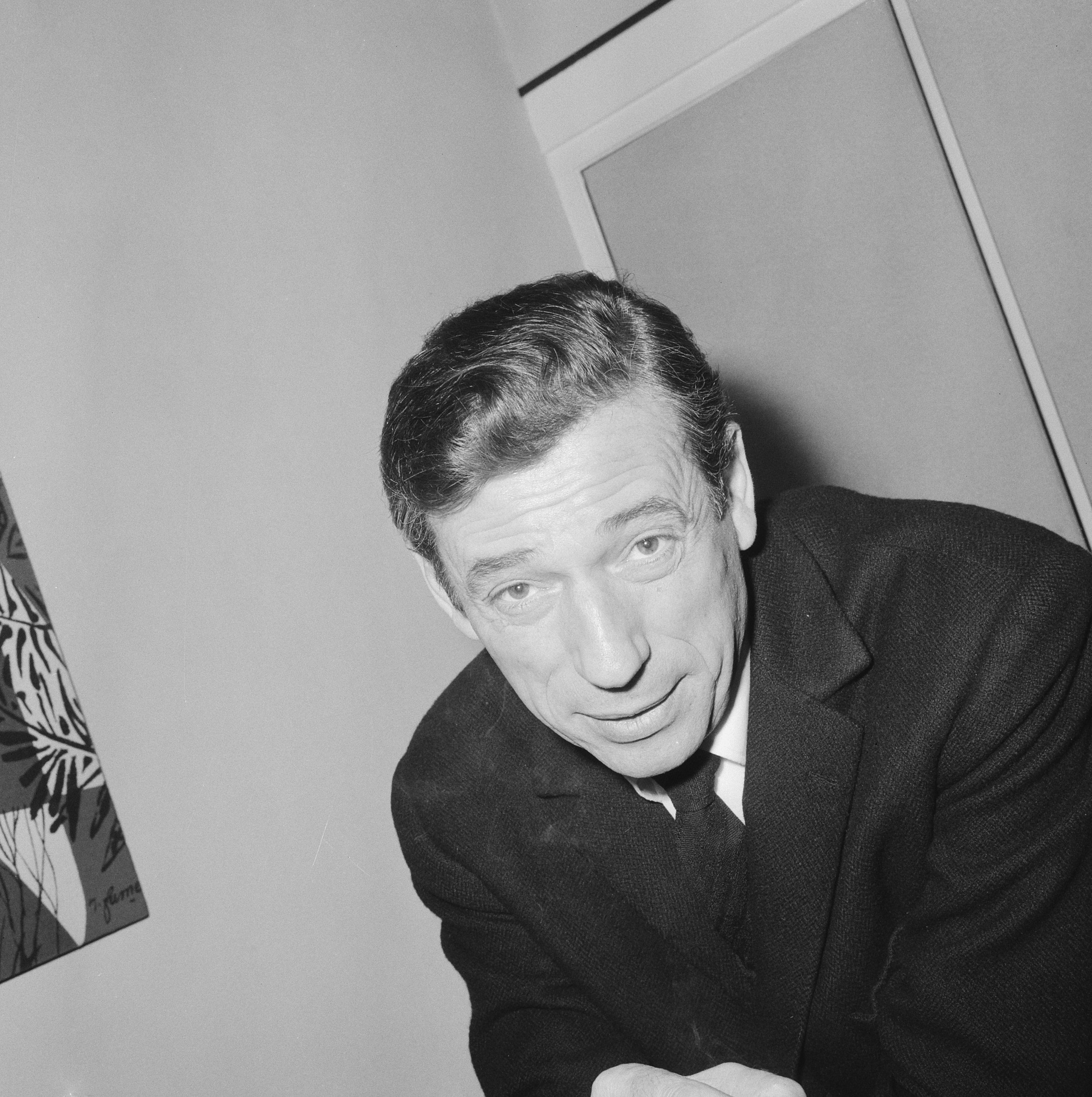 Collectie / Archief : Fotocollectie Anefo Reportage / Serie : [ onbekend ] Beschrijving : Yves Montand in ons land voor optreden in Koninklijke Schouwburg te Den Haag Datum : 9 februari 1965 Locatie : Den Haag, Zuid-Holland Trefwoorden : acteurs, filmsterren, portretten, zangers Persoonsnaam : Montand, Yves Fotograaf : Nijs, Jac. de / Anefo Auteursrechthebbende : Nationaal Archief Materiaalsoort : Negatief (zwart/wit) Nummer archiefinventaris : bekijk toegang 2.24.01.03 Bestanddeelnummer : 917-4146